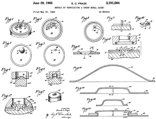 弗莱兹的初版易拉罐拉环专利设计图